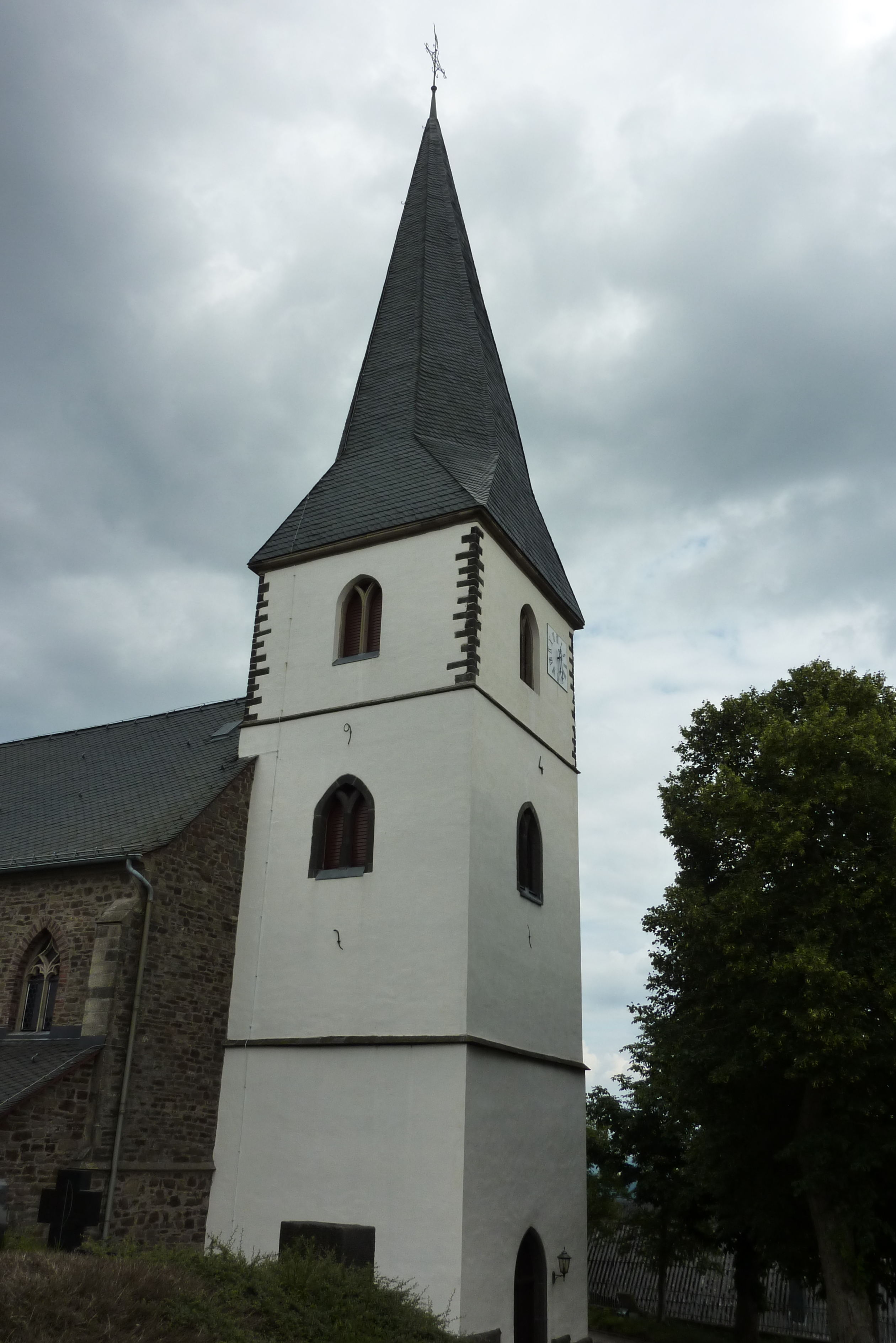 Katholische Pfarrkirche St. Michael (Reifferscheid), Außenansicht mit spätgotischem Turm